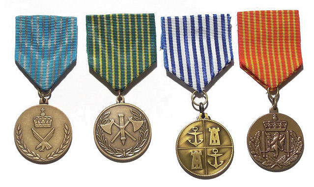 Norske Vernedyktighetsmedaljer